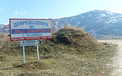 Влез во мал Холивуд ( Штавица )